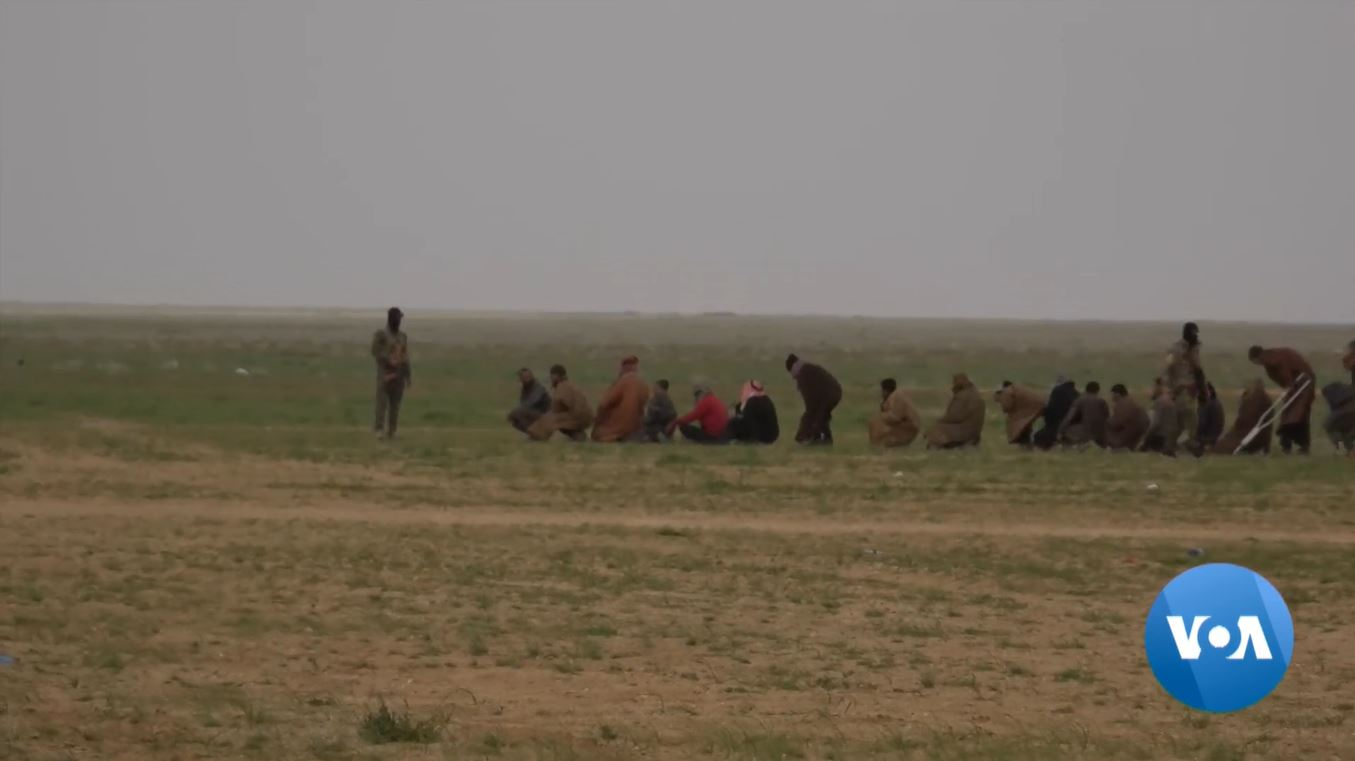 Bataille de Baghouz entre les Forces démocratiques syriennes et l'État islamique, fin février 2019.